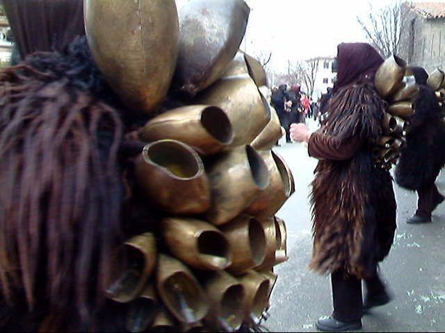 Momento del Carnevale di Mamoiada